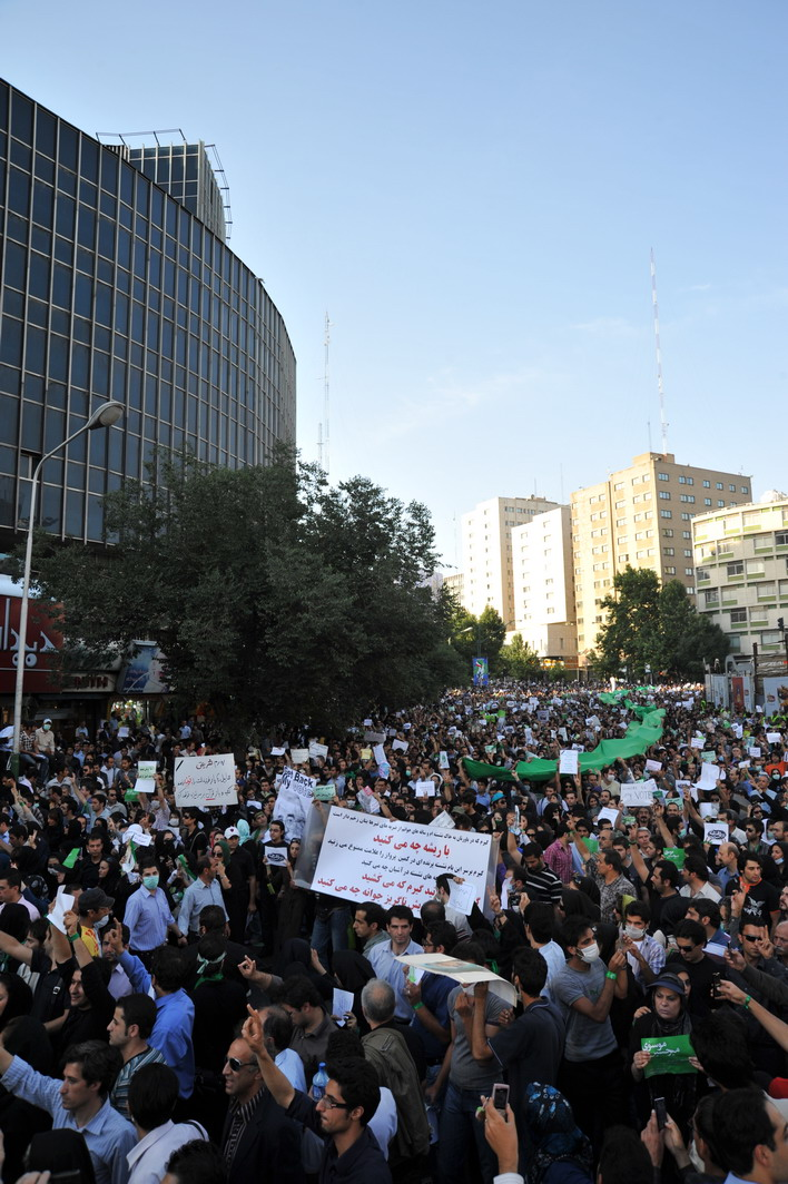 Protest in Vali Asr Square, Tehran